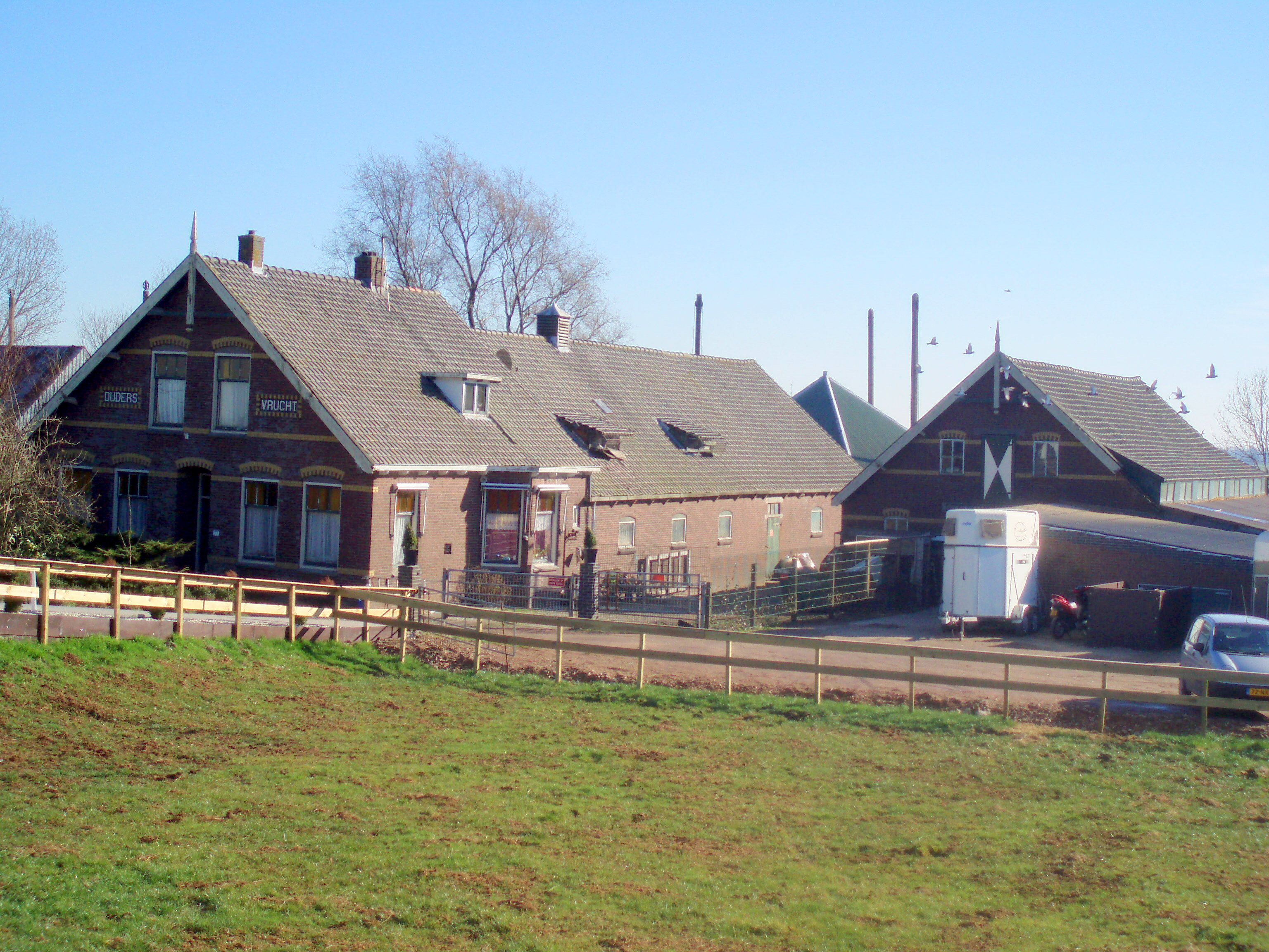 Langhuisboerderij Ouders Vrucht in Willeskop, nr. 77. Volgens het Monumenten Inventarisatie Project van lokaal cultuurhistorisch belang.